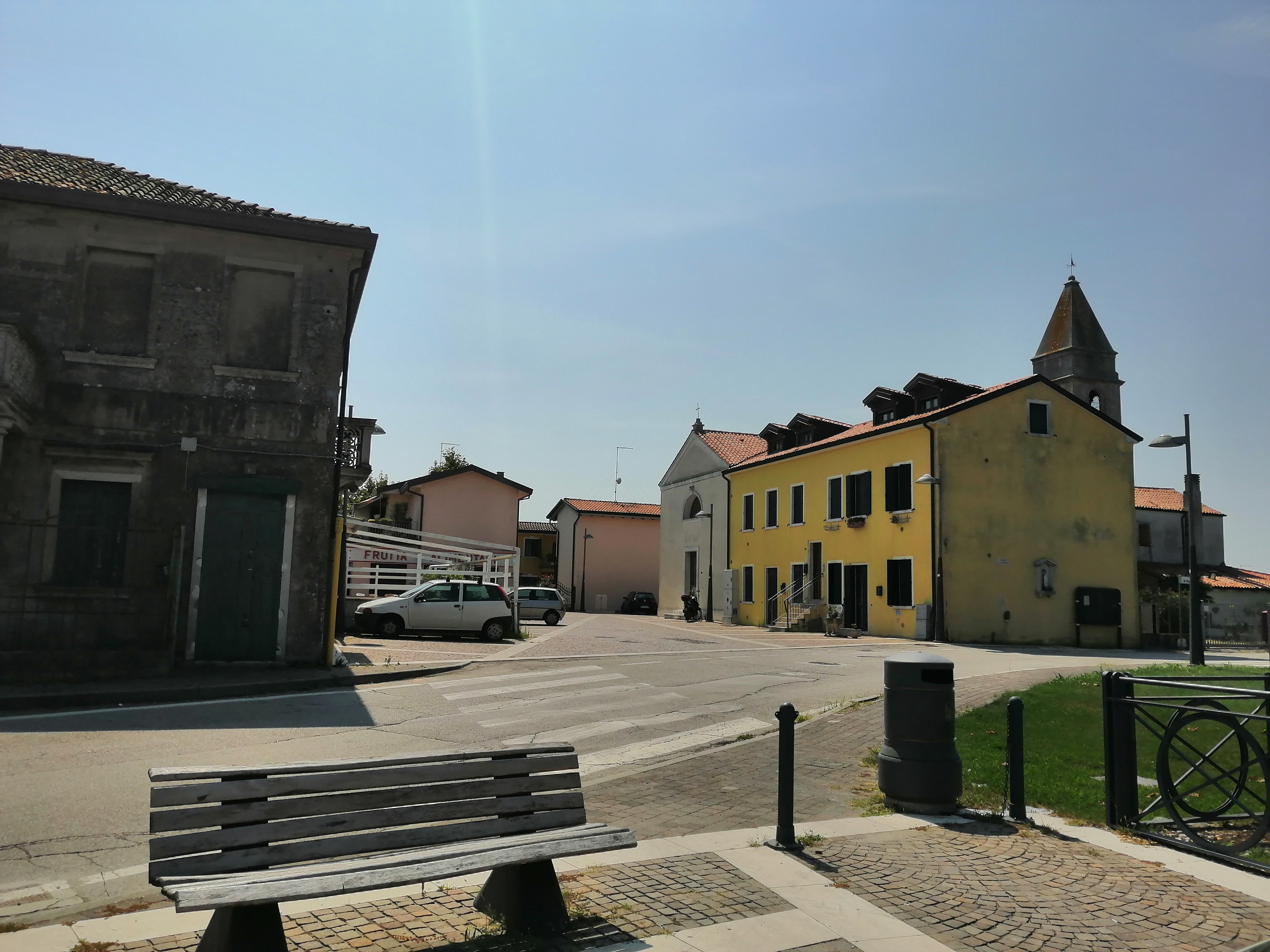 Piazza vecchia del paese con la prima chiesa parrocchiale.